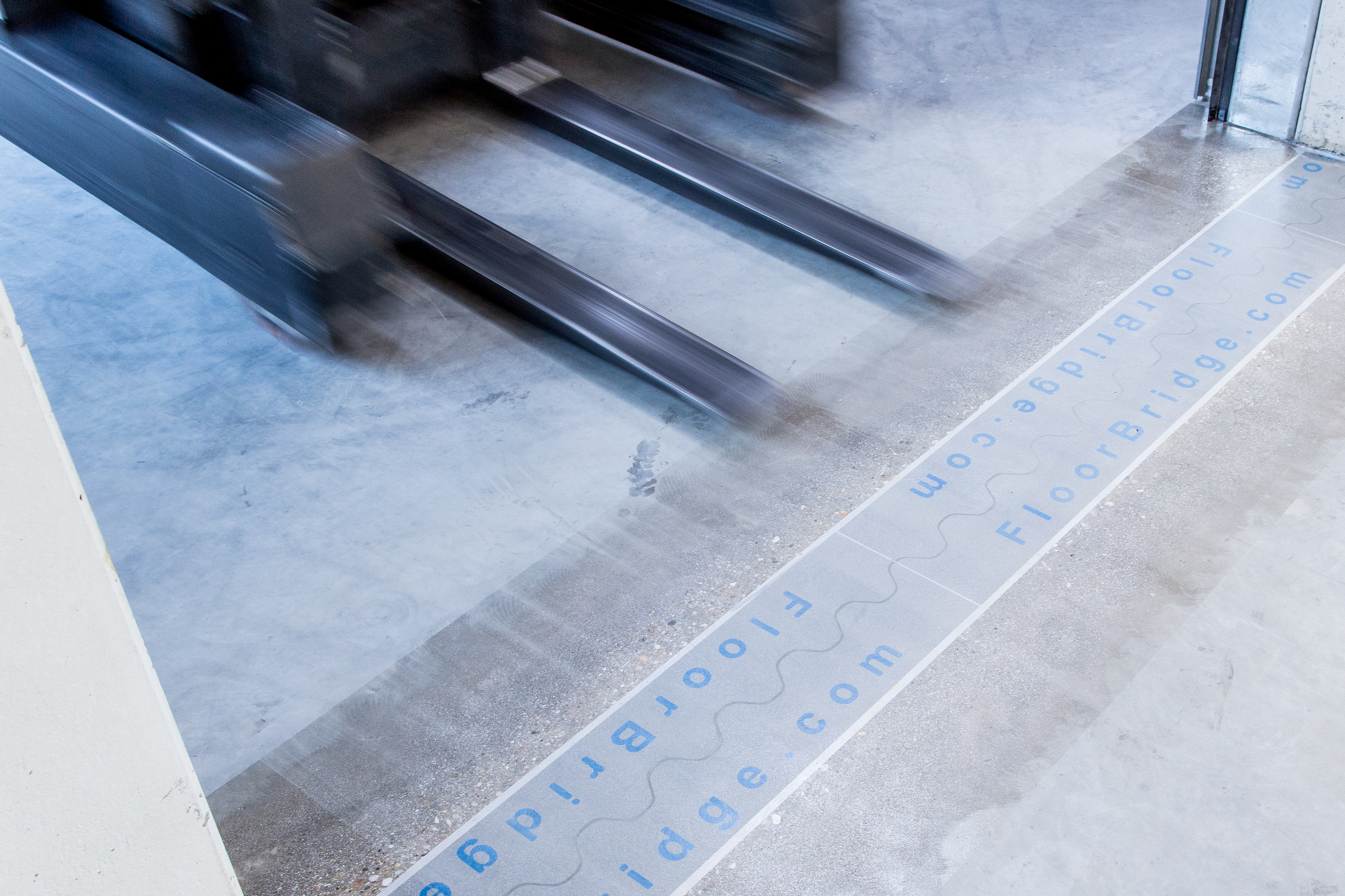 Toepassing van een dilatatieprofiel met de sinusvoeg in bedrijfsvloeren